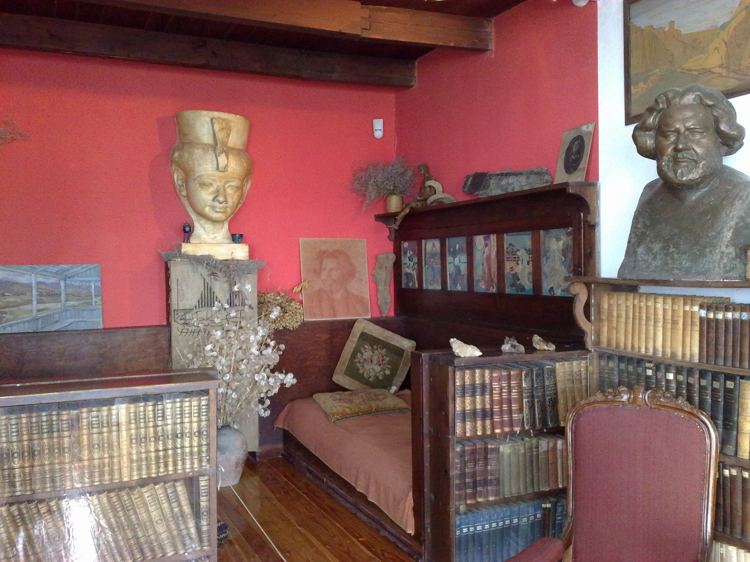 Будинок-музей Максиміліана Волошина — музей в Коктебелі, Крим, Україна